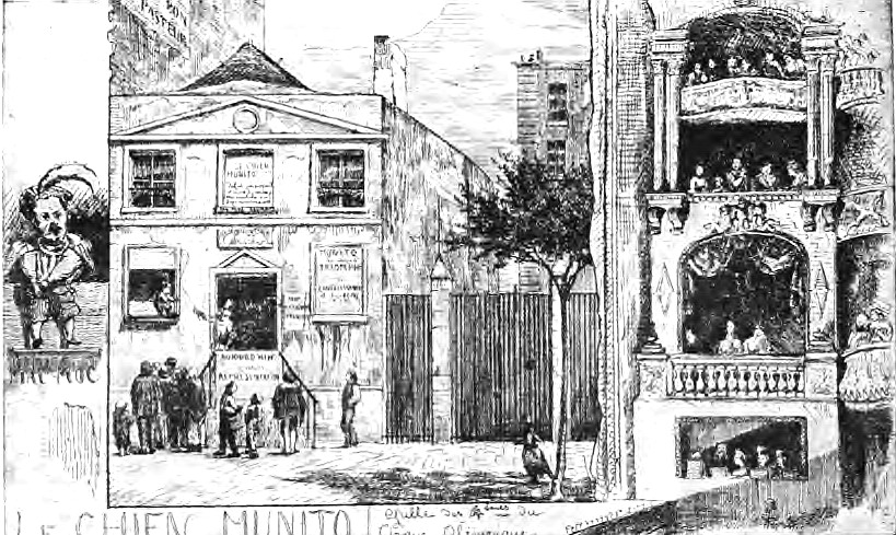 Le Cirque Olympique. Le chien Munito, d'après une eau-forte de Martial. Ce cirque fut ouvert par Antoine Franconi en 1788, Rue du Faubourg-du-Temple à Paris. Un certain Nief, ressortissant hollandais, y produisit son chien savant nommé Munito dans les années 1814/20. Le cirque, détruit en 1826 par un incendie, fut rebati sur le Boulevard du Temple.